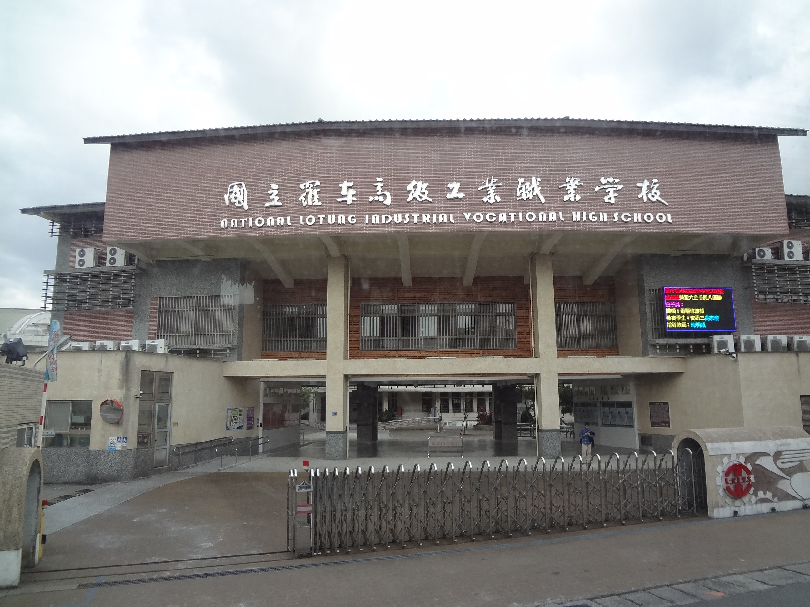 中文（台灣）: 國立羅東高級工業職業學校，位於宜蘭縣冬山鄉廣興村廣興路117號。本照片係於遊覽車上拍攝。